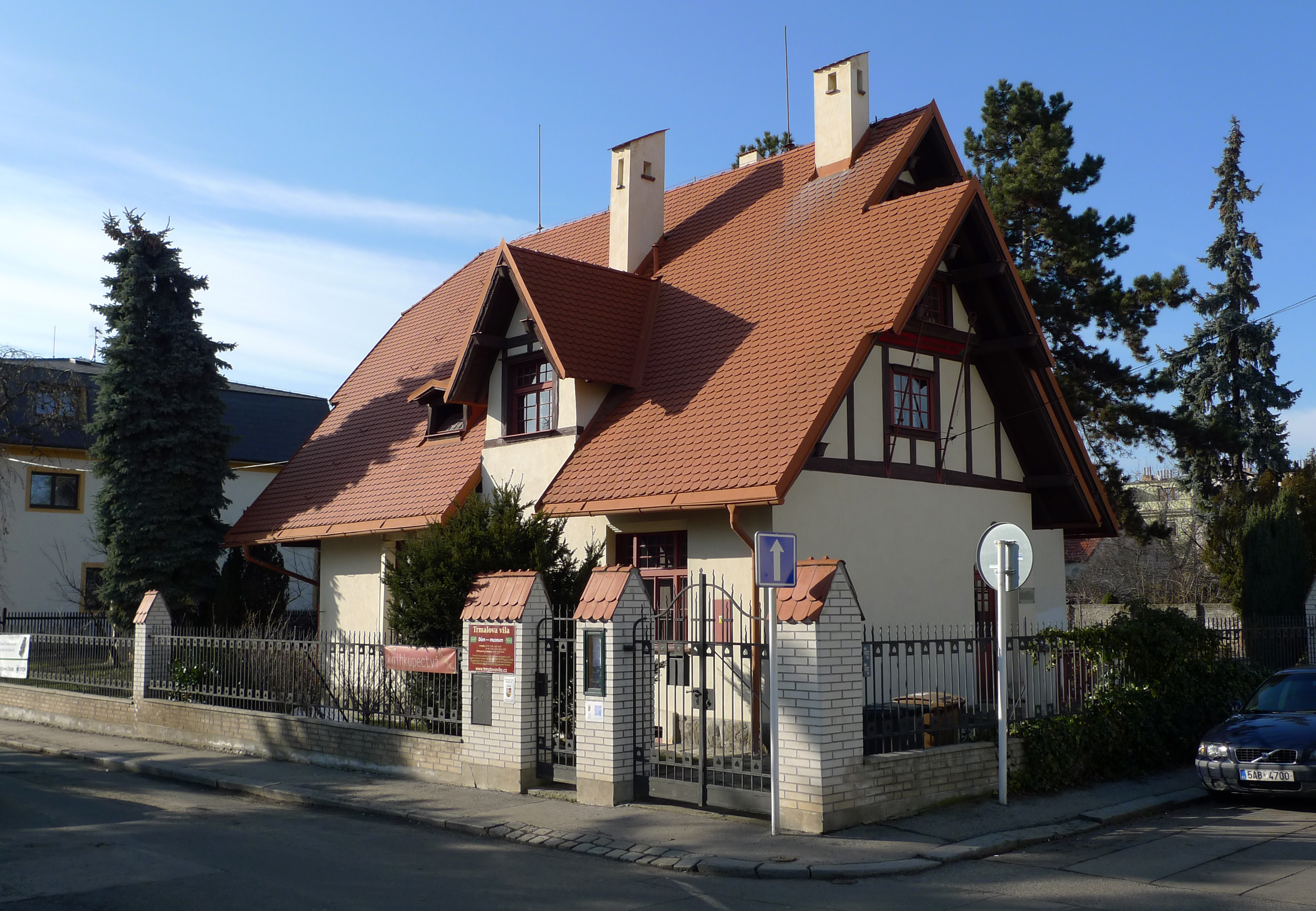 Trmalova vila ve Strašnicích v Praze 10